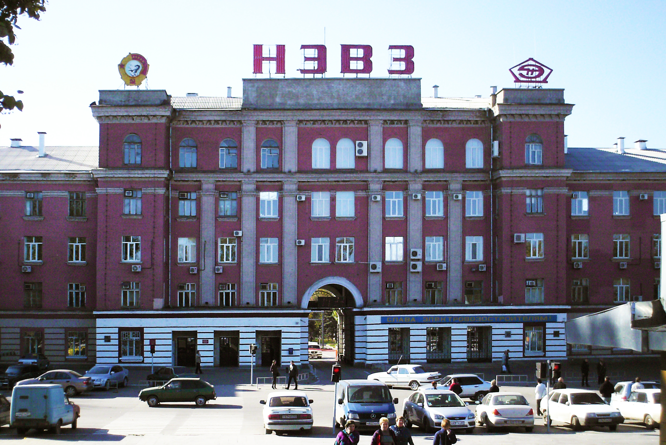 Изображение | Описание = Новочеркасский электровозостроительный завод | Автор = © Артёмка | Время создания = октябрь 2007 | Источник = © Артёмка